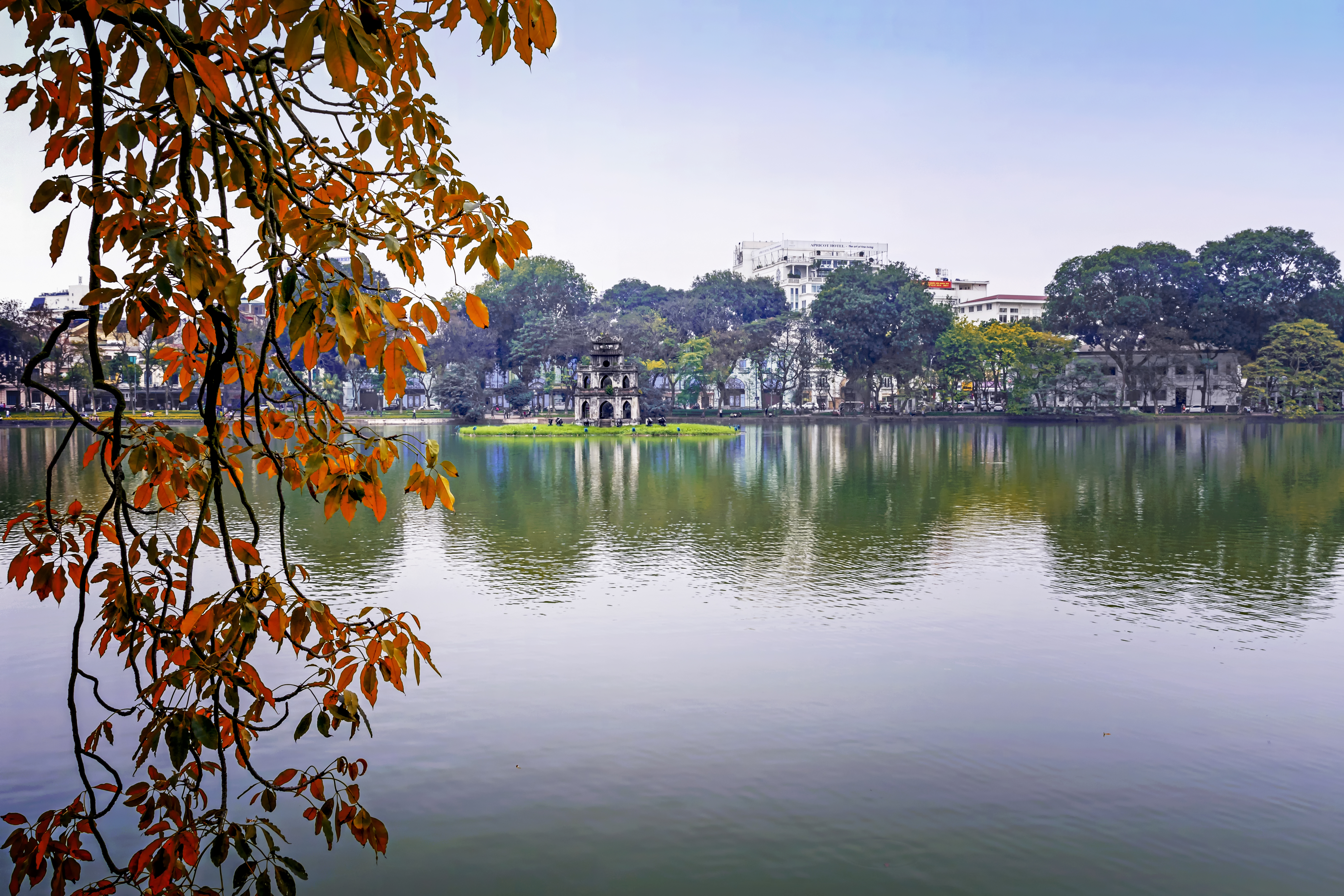 Hồ Hoàn Kiếm còn được gọi là Hồ Gươm, là một hồ nước ngọt tự nhiên nằm ở trung tâm thành phố Hà Nội, Việt Nam.